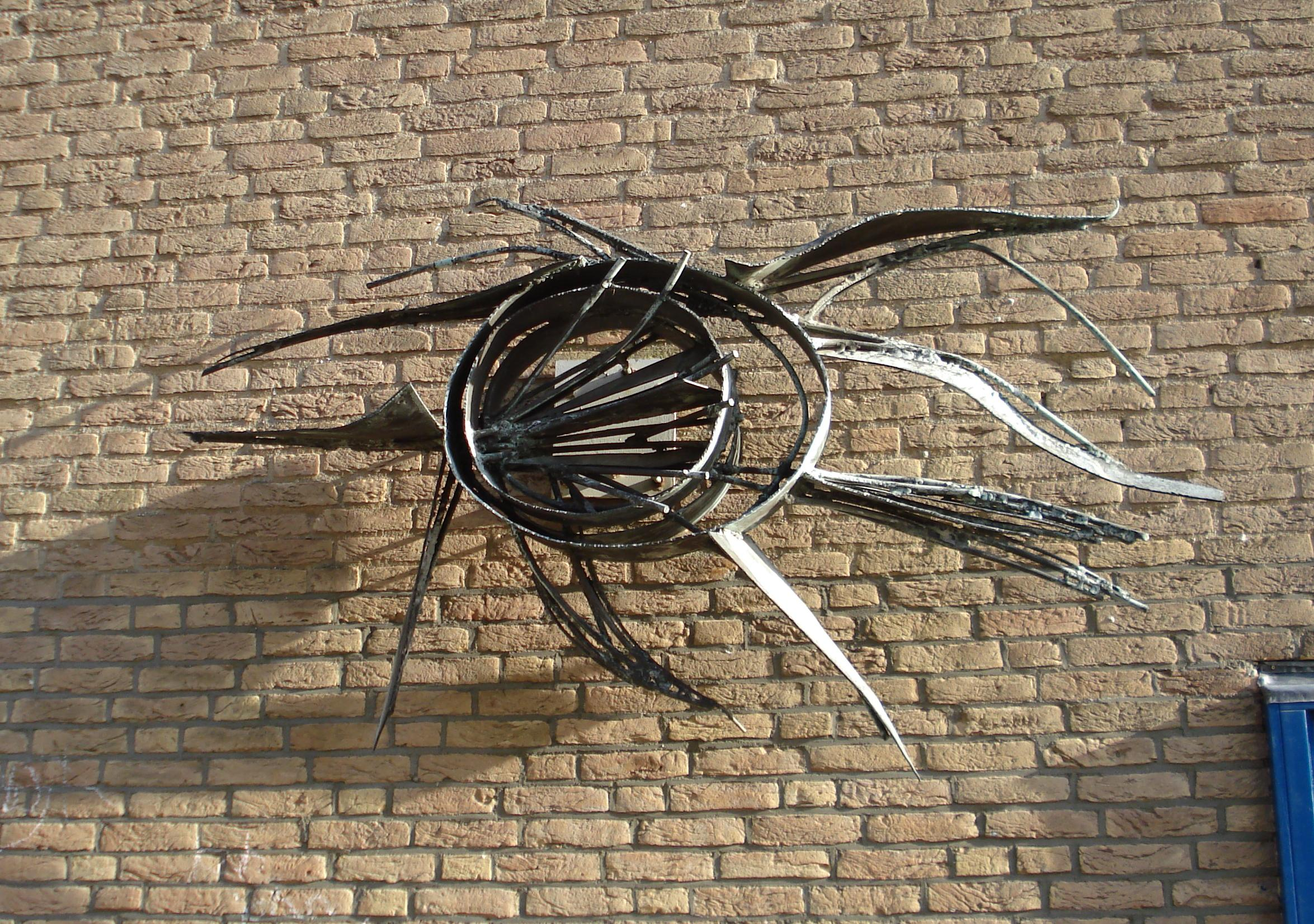 Den Haag, Isabellaland. Kunstwerk "Zon" van Aart van den IJssel. The Hague/The Netherlands.